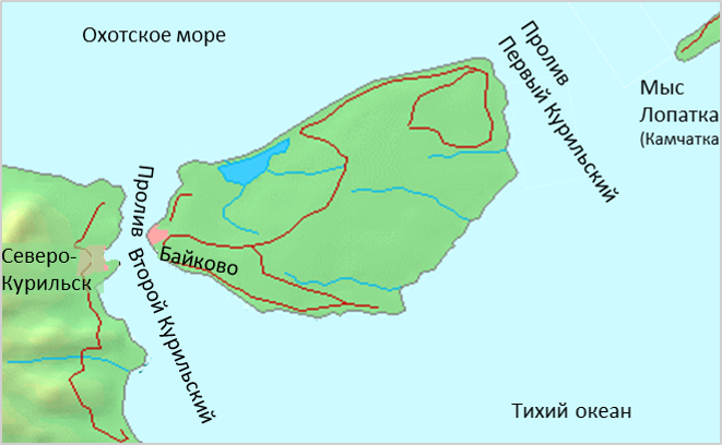 Русифицированная карта острова Шумшу